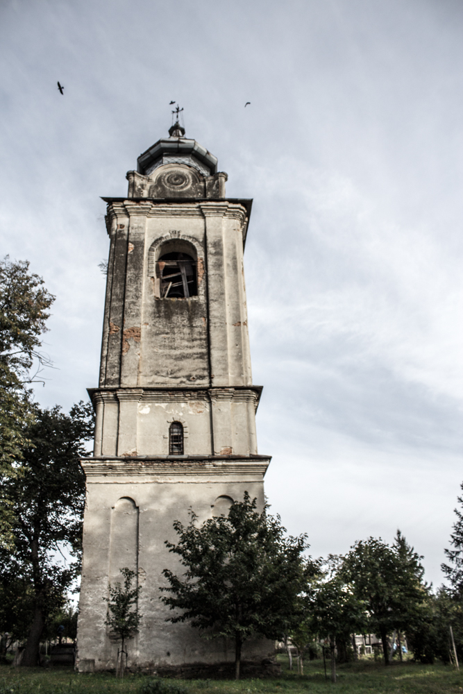 Clopotnița independentă a bisericii armenești este realizată pe 3 niveluri, dintre care primele două sunt boltite. Fațadele sunt decorate cu nișe la primul nivel, asemănătoare decorului clopotnișei Sf. Ilie (Botoșani) și cu pilaștri ce accentuează verticalitatea volumului de zidărie, supraînălțat printr-o complicată învelitoare cu pinioane în arc de cerc, care ar putea fi rezultatul înnoirii din 1832, amintită de inscripția așezată deasupra intrării în capela de sud a bisericii. Ușa de la intrarea în turnul-clopotniță poartă data 1816, dar desăvârșita unitate a concepției arhitecturale permite ipoteza ridicării clopotniței odată cu biserica. - extras din Eugenia Greceanu - Ansamblul Urban Medieval Botoșani: Botoșanii care s-au dus - 02